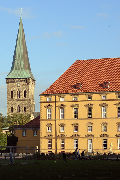 Schloss von Osnabrück, fotografiert von Lennart Meinz, gemeinfrei.